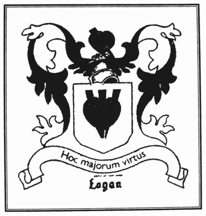 ലോഗൻ കുടുംബത്തിന്റെ മുദ്ര. 1887-ൽ പുറത്തിറങ്ങിയ മലബാർ മാനുവലിൽ നിന്ന്.